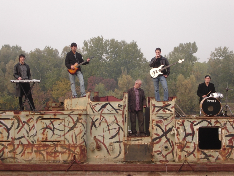 Krle i Inspektori na snimanju spota za pjesmu Šrot, u režiji braće Pejić. Studeni, 2008.